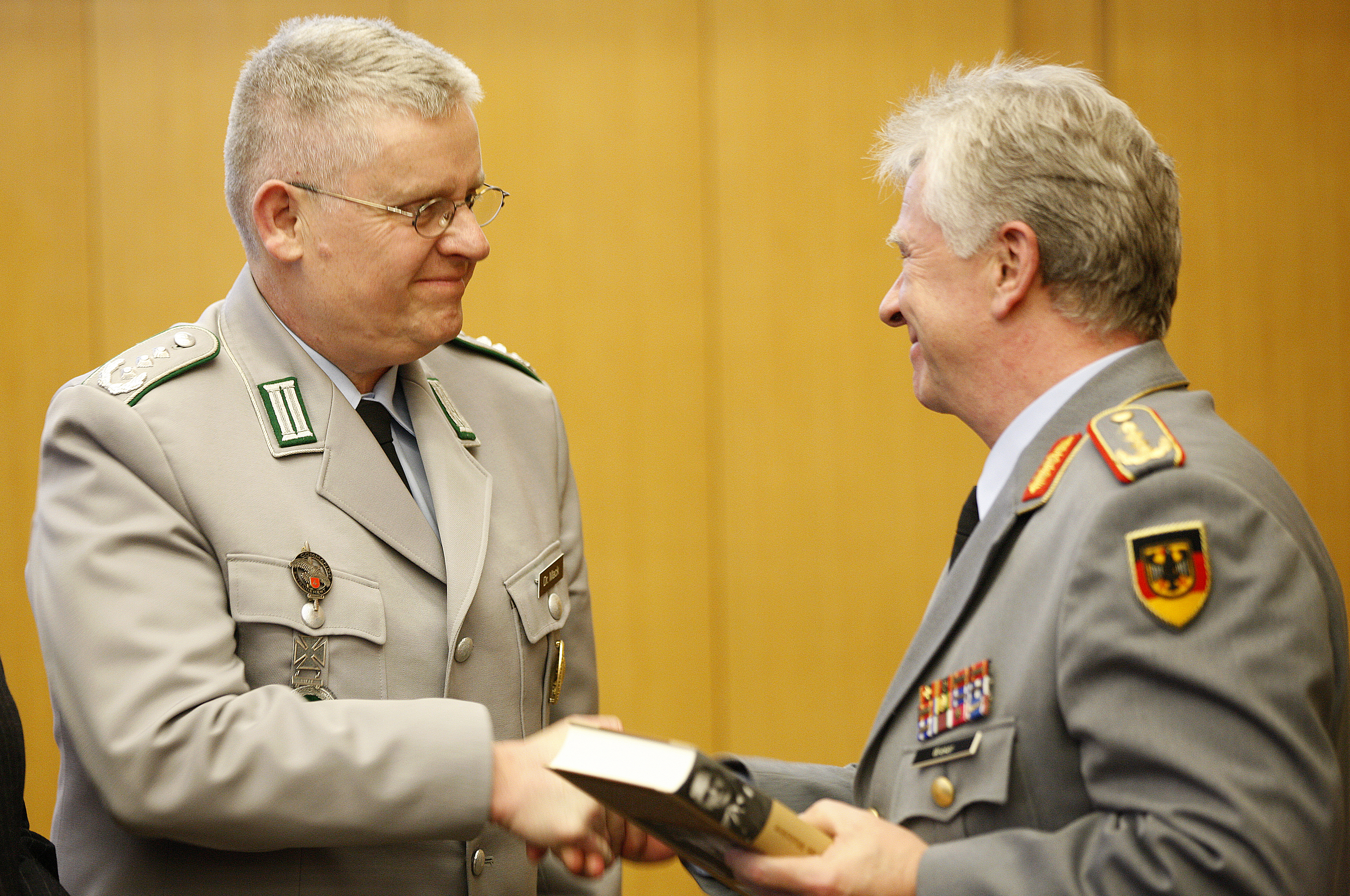 Der Generalinspekteur der Bundeswehr, General Volker Wieker würdigt im Rahmen eines Festaktes zum 100.Geburtstag von General Ulrich de Maizière seinen Amtsvorgänger als Generalinspekteur ( 1966-1972 ) am ersten Dienstsitz des Bundesministeriums der Verteidigung. Ulrich de Maizière gilt als einer der Väter der Inneren Führung. Die Konzeption der Inneren Führung prägt bis heute das Selbstverständnis der Soldatinnen und Soldaten der Bundeswehr. Hier: Oberst Dr. Hans-Hubertus Mack, Amtschef des Militärgeschichtlichen Forschungsamtes der Bundeswehr übergibt die Biografie von Ullrich de Maizière an den Generalinspekteur der Bundeswehr, General Volker Wieker.© Bundeswehr /Ströter